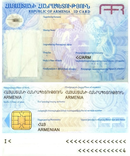 Tarjeta ID del ciudadano de Armenia (DNI)